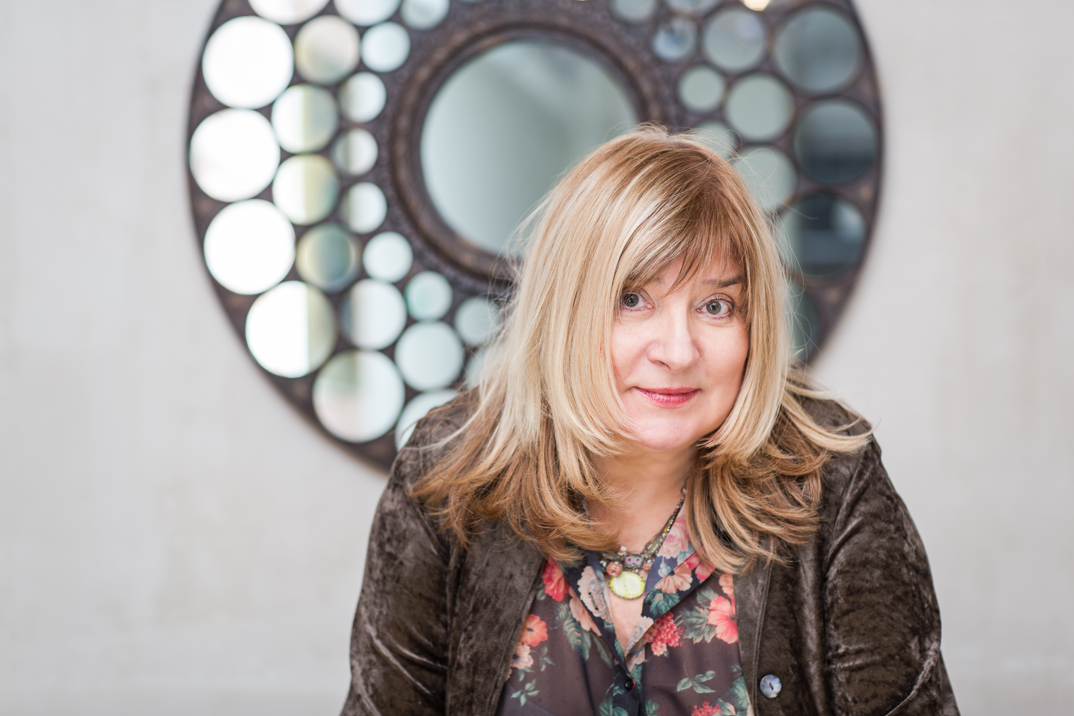 Remis Scerbauskas FOTO